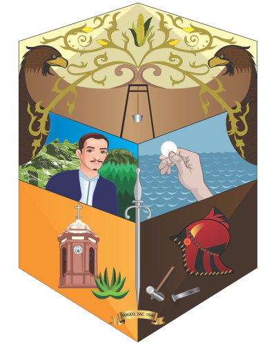 El escudo del municipio fue realizado por el ayuntamiento de 1992-1995. Significado: Cabezas de águila: la fuerza de dos civilizaciones (la española y la autóctona) y el momento de su encuentro en la posición frente a frente. Torre y malacate: el descubrimiento de minerales se tradujo en el establecimiento de las minasque propiciaron su fundación. Personaje Martín de Zavala de Sepúlveda, nació en el real de Pánuco, Zacatecas y fue quien fundo el reino de Nuevo León y Monterrey, y su capital, al fondo los cerros de la Bufa y de la Silla simboliza su identidad Zacatecana. Mar y mano con ostia: significado de Pánuco: hombres que llegaron del mar y pan eucarístico. Torre religiosa: Simboliza la fé que el pueblo en sus creencias. Maguey: Símbolo del territorio. Casco guerrero y espada: tradiciones heredadas de la cultura española que se representan mediante festividades propias (enfrentamientos entre turcos y cristianos). Mazorca: fruto de las generaciones y símbolo de la agricultura. Marro y cuña: herramientas de trabajo utilizadas para la explotación del mineral. Ramificaciones amarillas: el florecimiento de una nueva cultura. Arco: año de fundación de Pánuco, 1 de noviembre de 1548